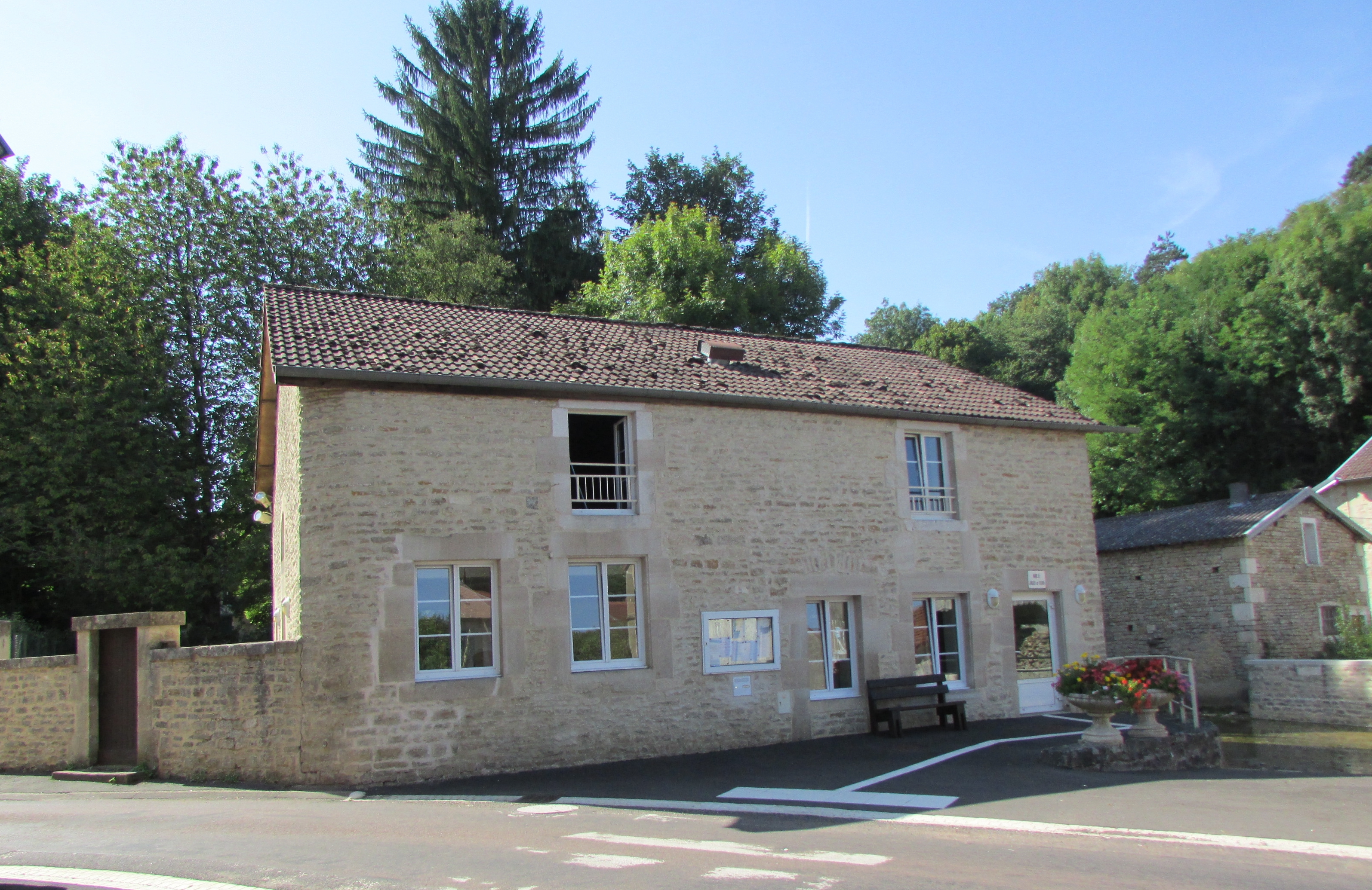 La mairie